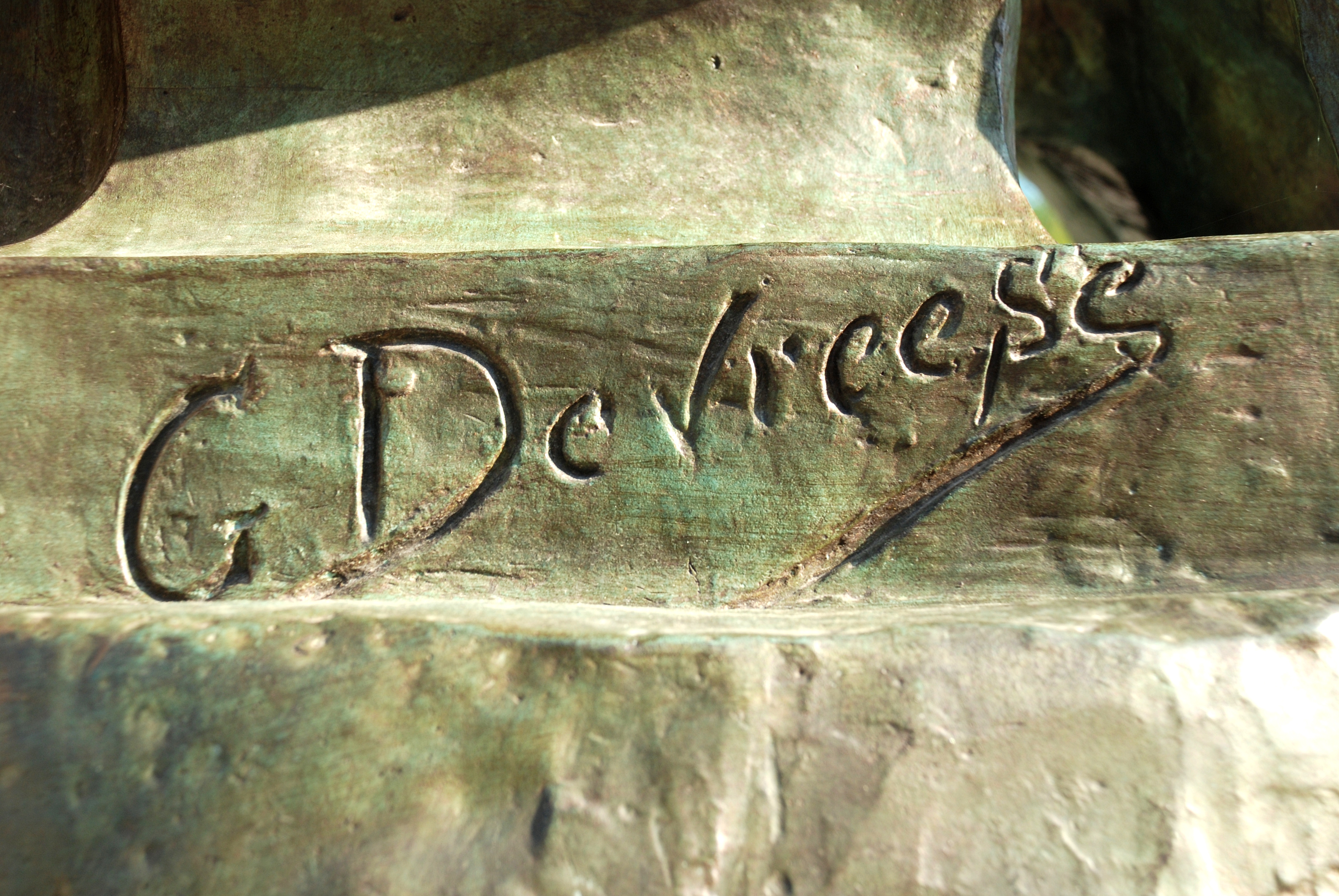 Belgique - Brabant wallon - Court-Saint-Étienne - Monument à Émile Henricot (signature de Godefroid Devreese)